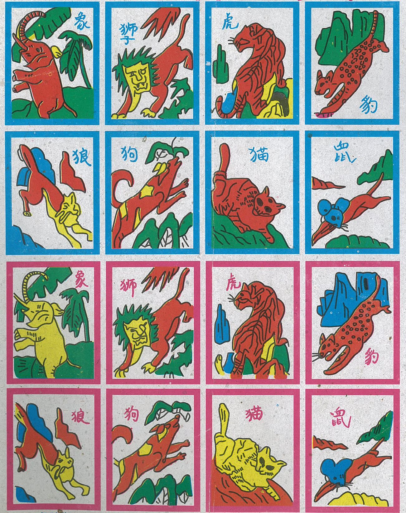 中文（台灣）: 河北白溝芙蓉市場的洋片-獸棋智力遊戲